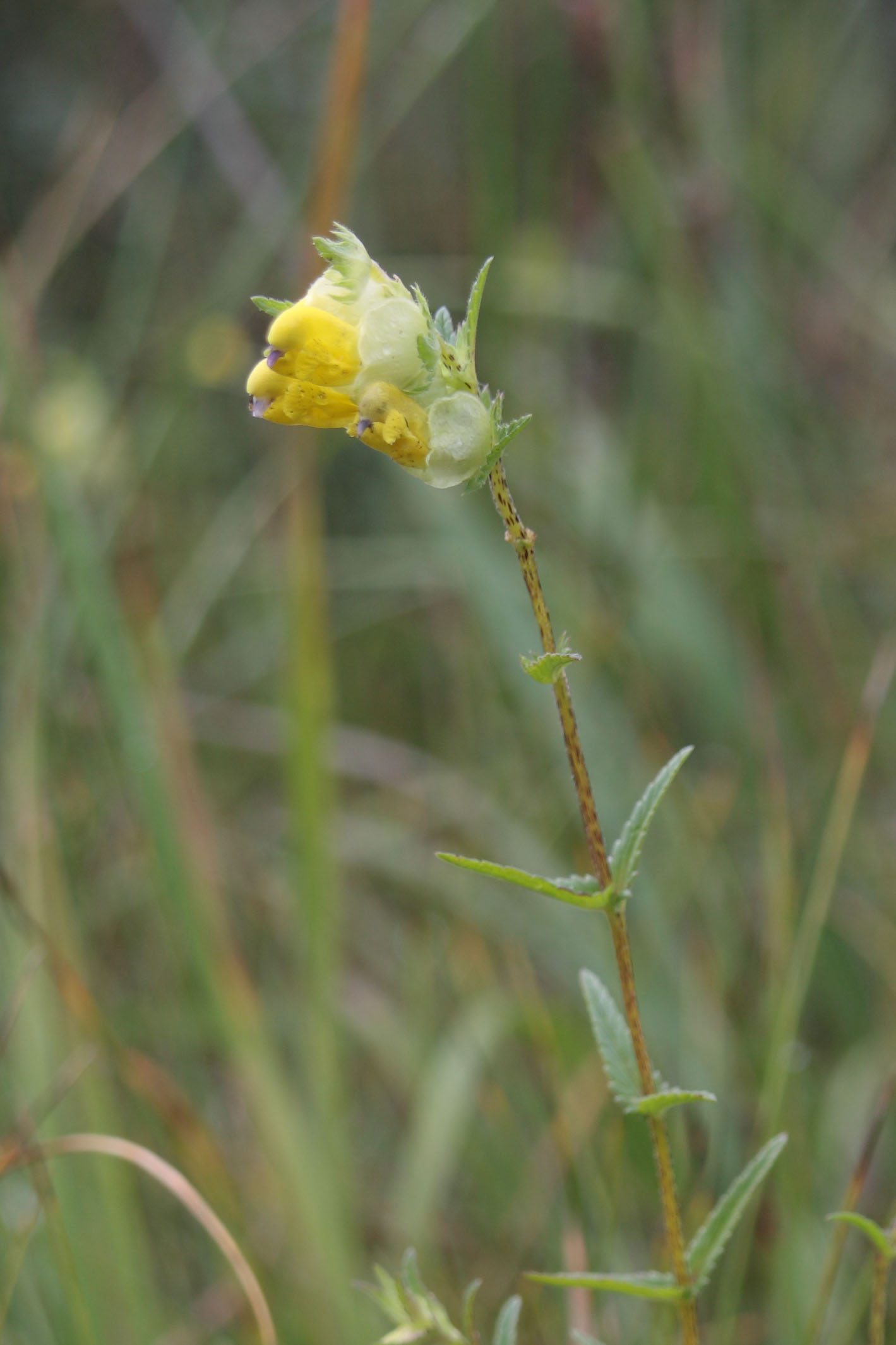 Saaremaa robirohu õis. Viidumäe.